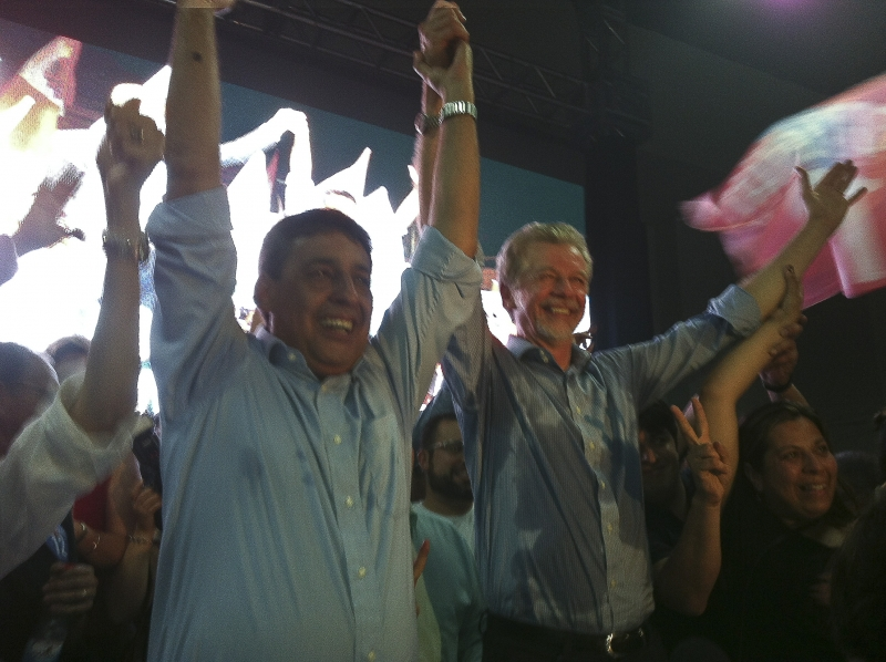 O prefeito reeleito de Porto Alegre, José Fortunati (D) e seu vice-prefeito, Sebastião Melo, comemoram a vitória com a militância